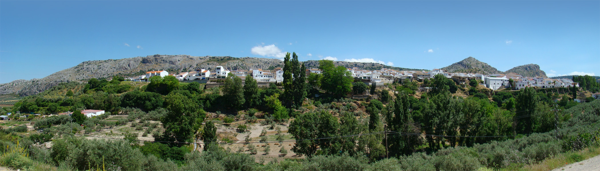 Cuevas del Becerro, Andalucía, España.